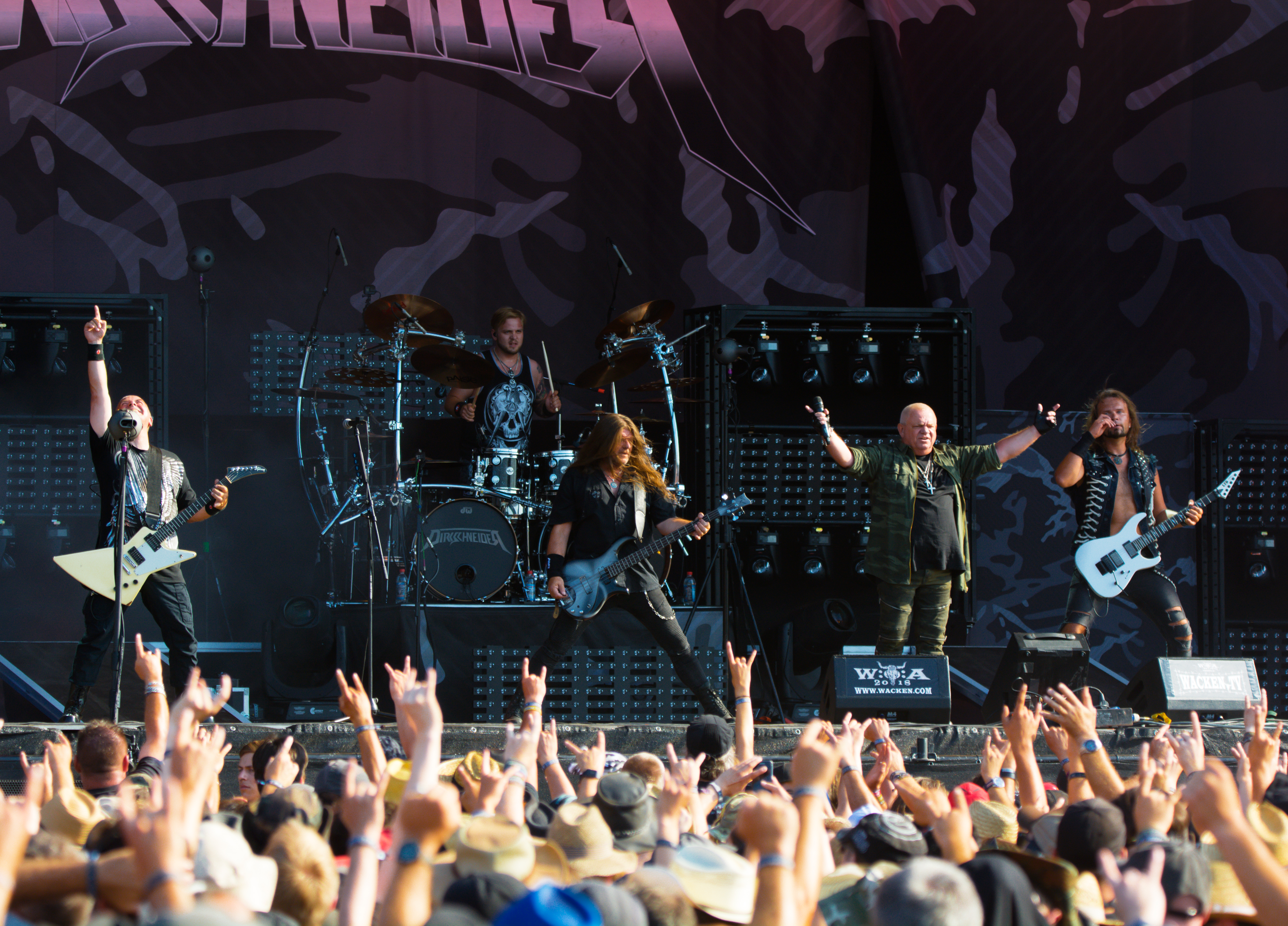 Dirkschneider beim Wacken Open Air 2018